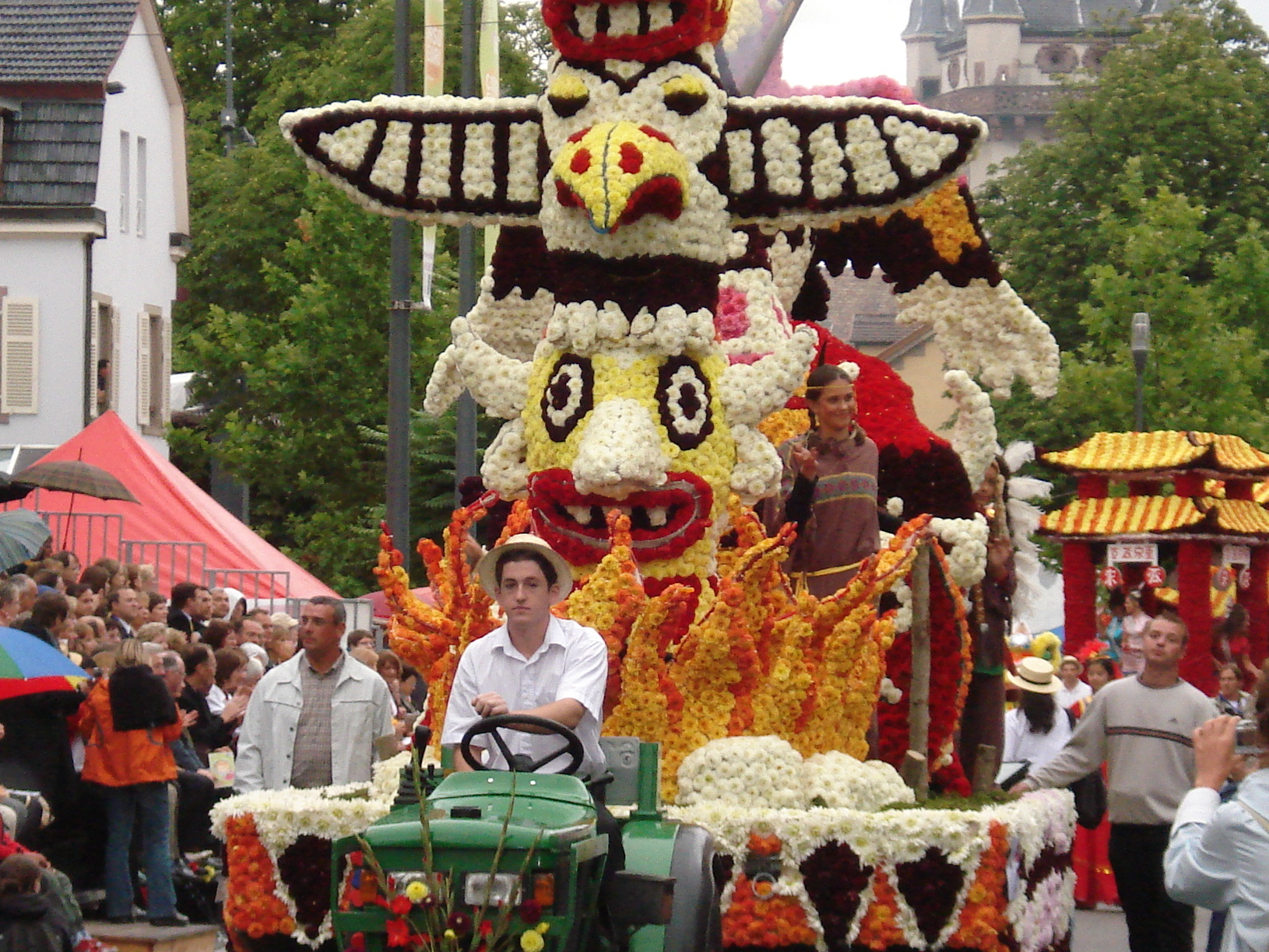 Corso Fleuri a Selestat Alsace